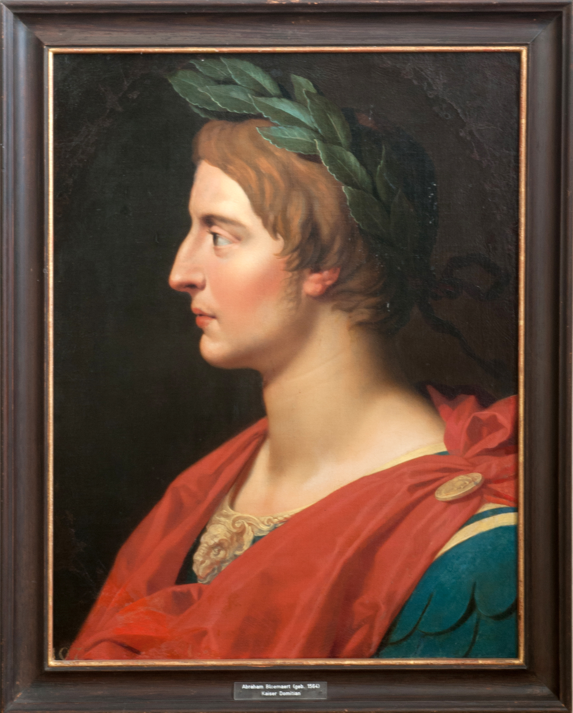 Teil einer Serie römischer Kaiserporträts niederländischer und flämischer Maler